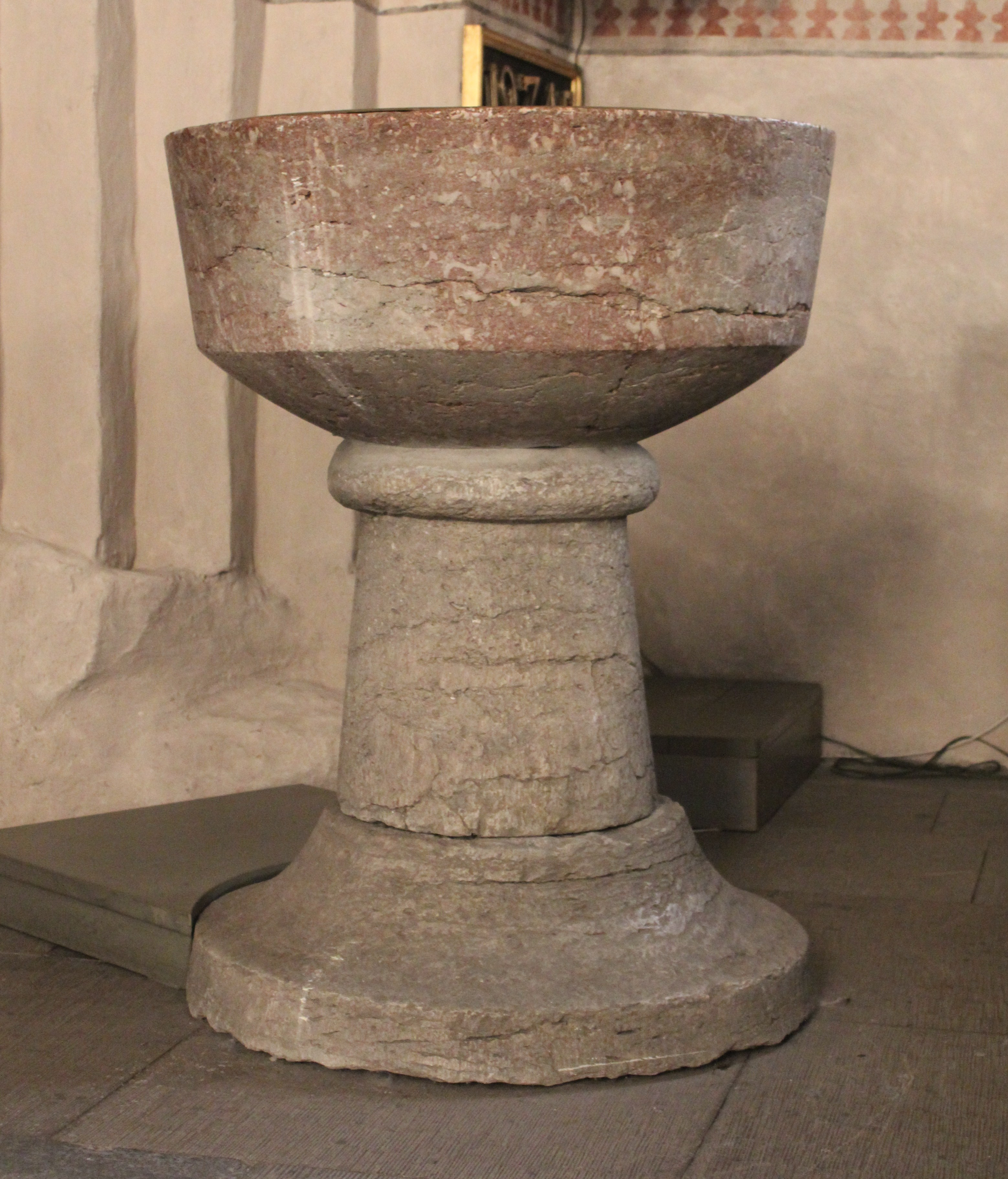 Roslags-Bro kyrka i Norrtälje kommun. Dopfunt.